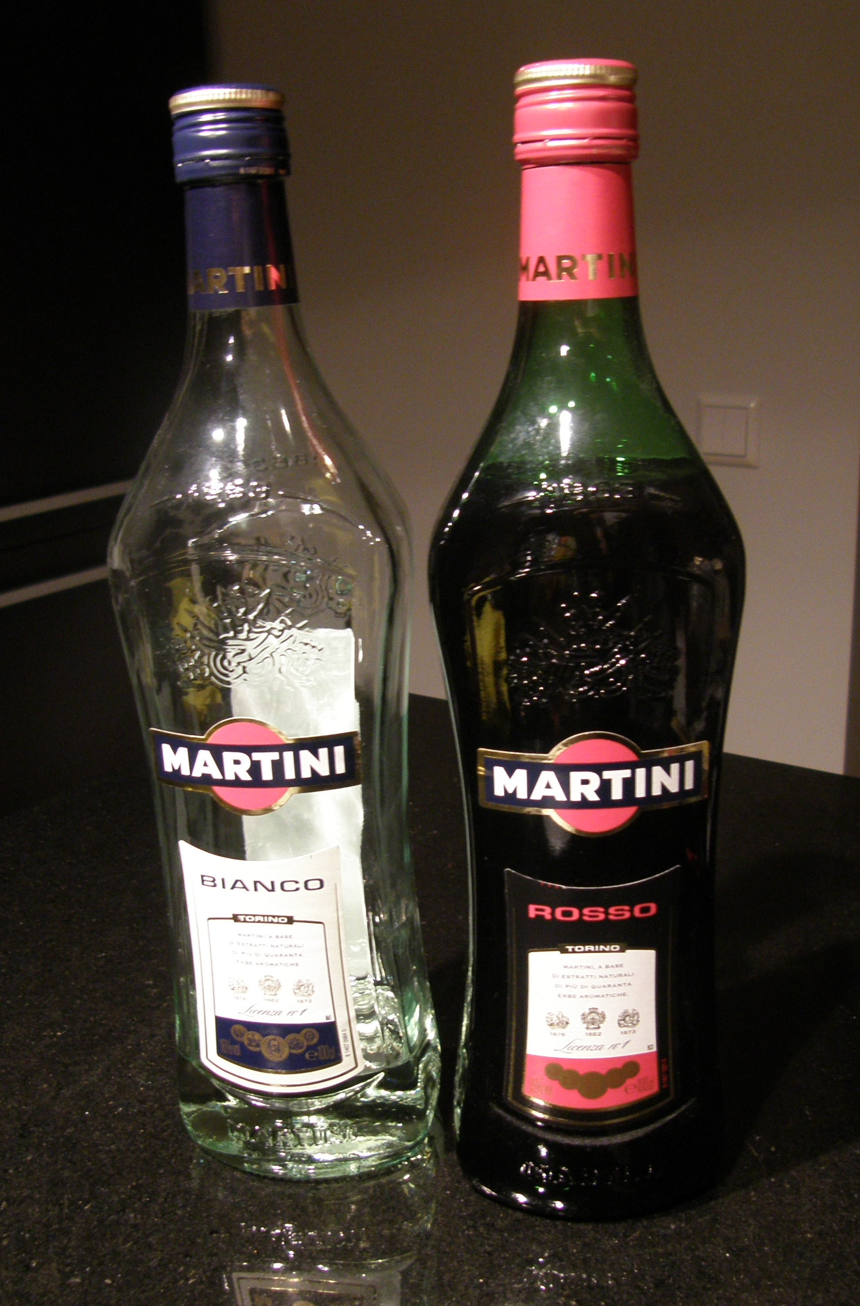 Martini Bianco ja Rosso.